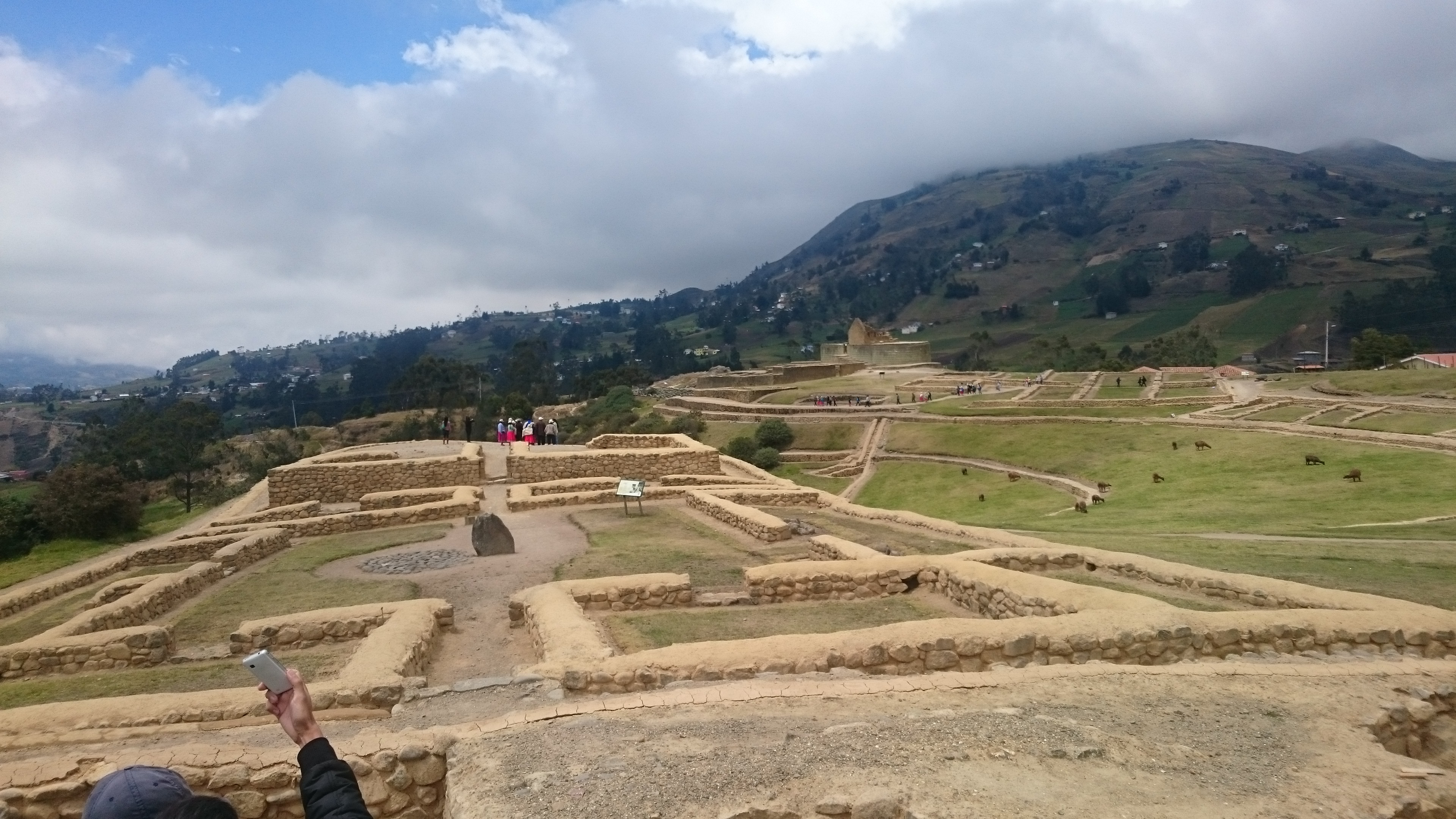 Ruinas de Ingapirca